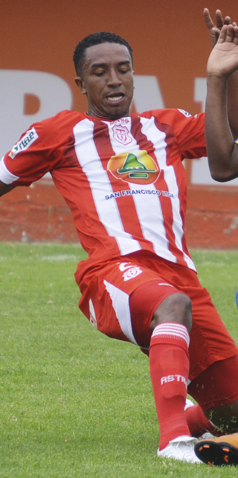 Jonathan Montenegro jugando para Técnico Universitario en el 2014